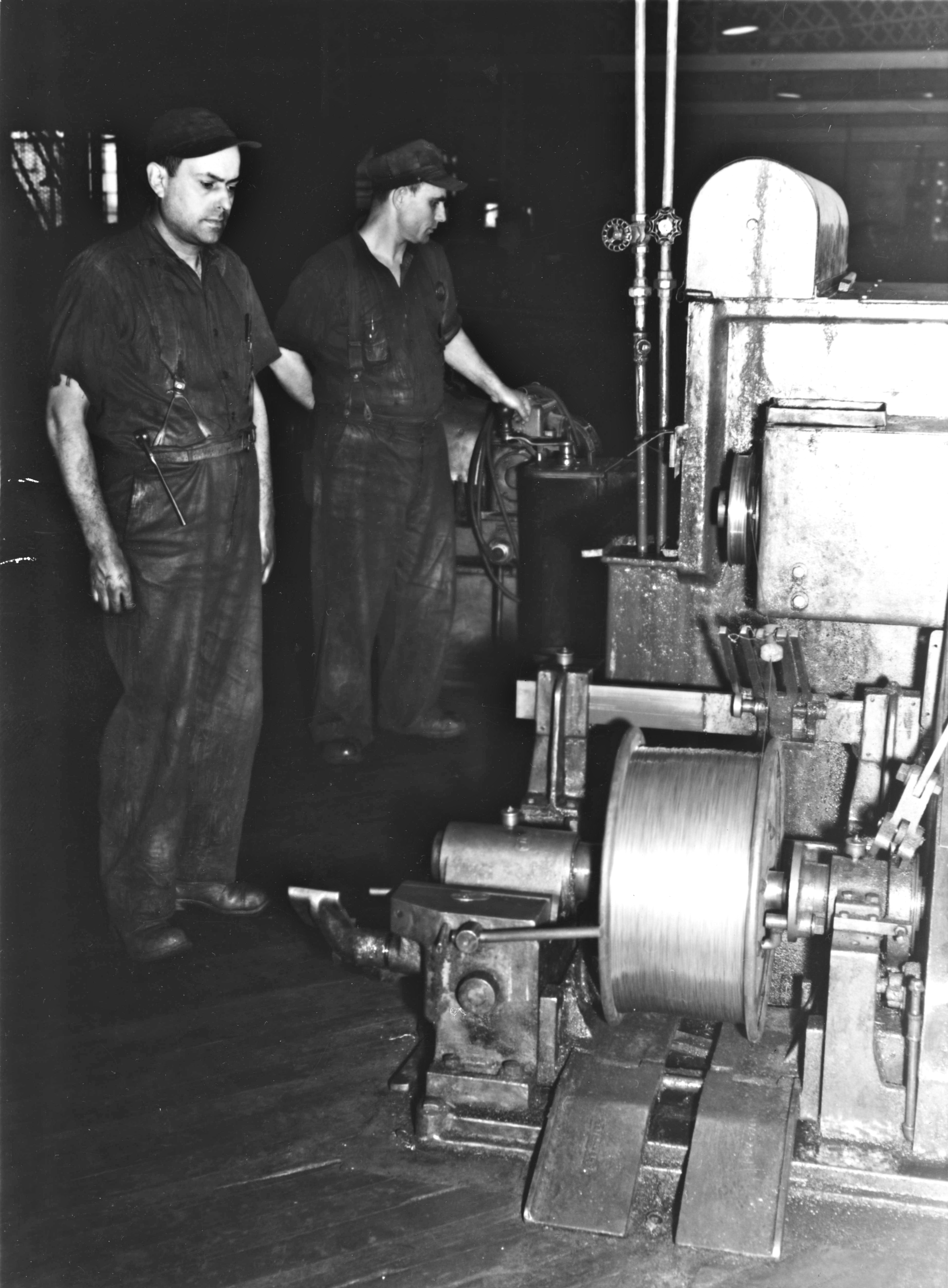 Travailleurs de la tréfilerie, usine 1, Alcan, Shawinigan. Une version un peu rognée de cette photo a été publiée dans La Revue de l'aluminium, Shawinigan Falls, vol. III, no 6, édition du 17 mars 1945, en page 6, où la légende de la photo précise que les deux tréfileurs sur cette photo sont Armand Arsenault et Donat Houle, qui surveillent la réduction du diamètre du fil d'aluminium, qui entrera ensuite dans la fabrication de câbles d'aluminium. L'article associé mentionne que les câbles d'aluminium sont produits pour les lignes de transmission électrique.